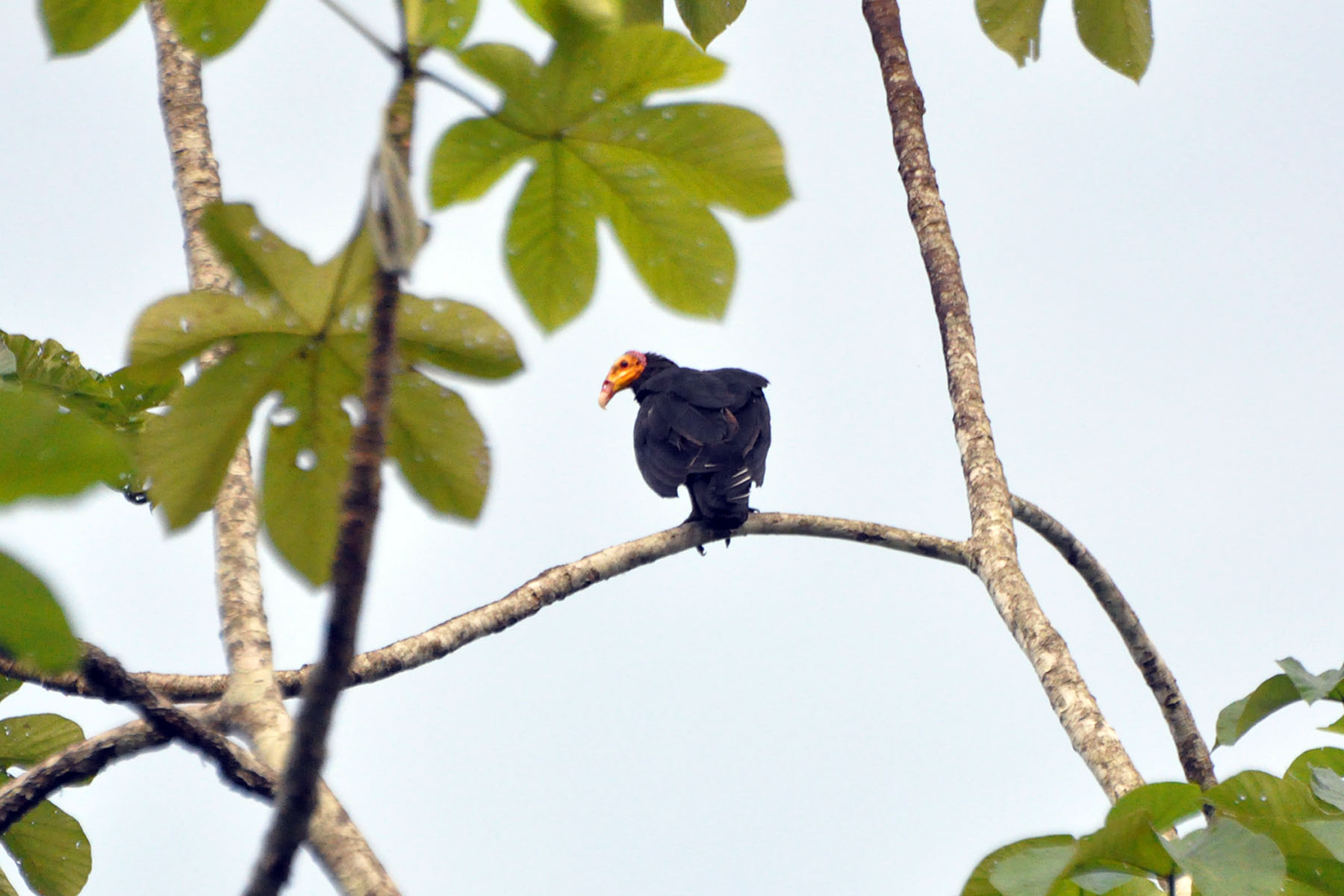 Cathartes melambrotus 24-Sep-10 Napo River, Ecuador